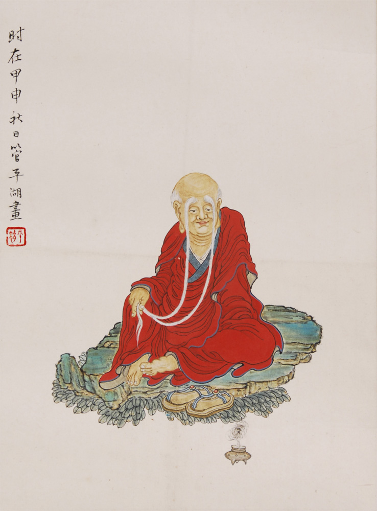 管平湖的《羅漢圖》，繪於甲申年（1944），44X32cm，紙本鏡心